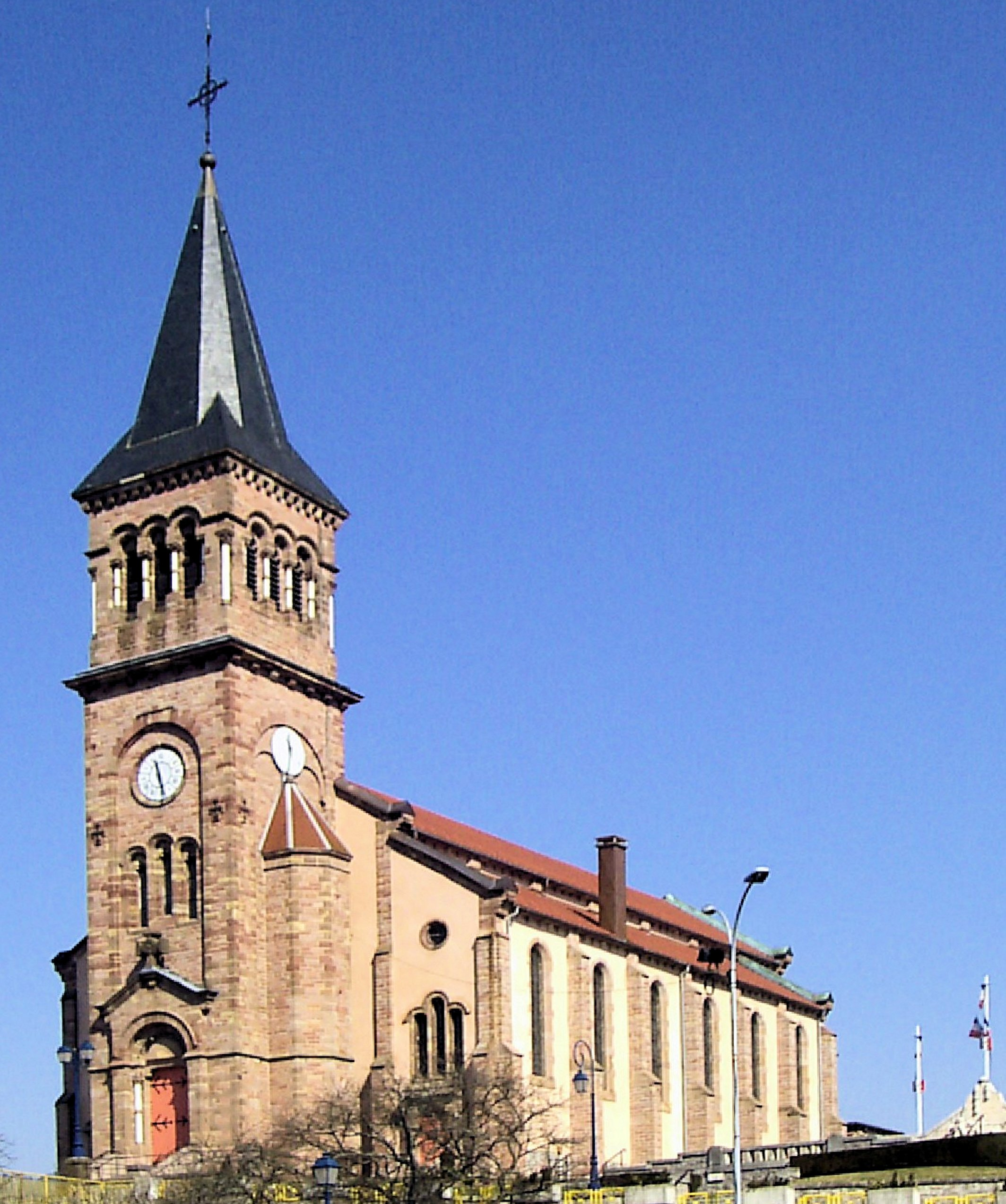 L'église Saint-Jean-Baptiste á Thillot